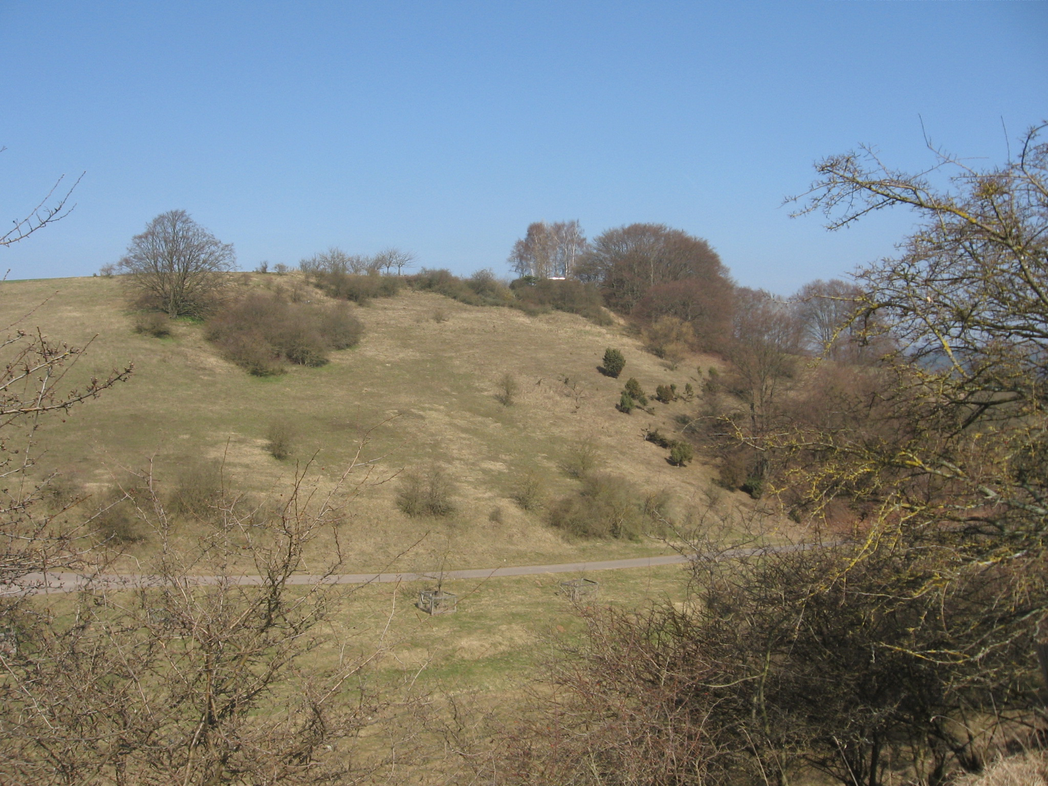 Teilfläche Weinberg im NSG Glockengrund von der südlichen Talseite des NSG aufgenommen.